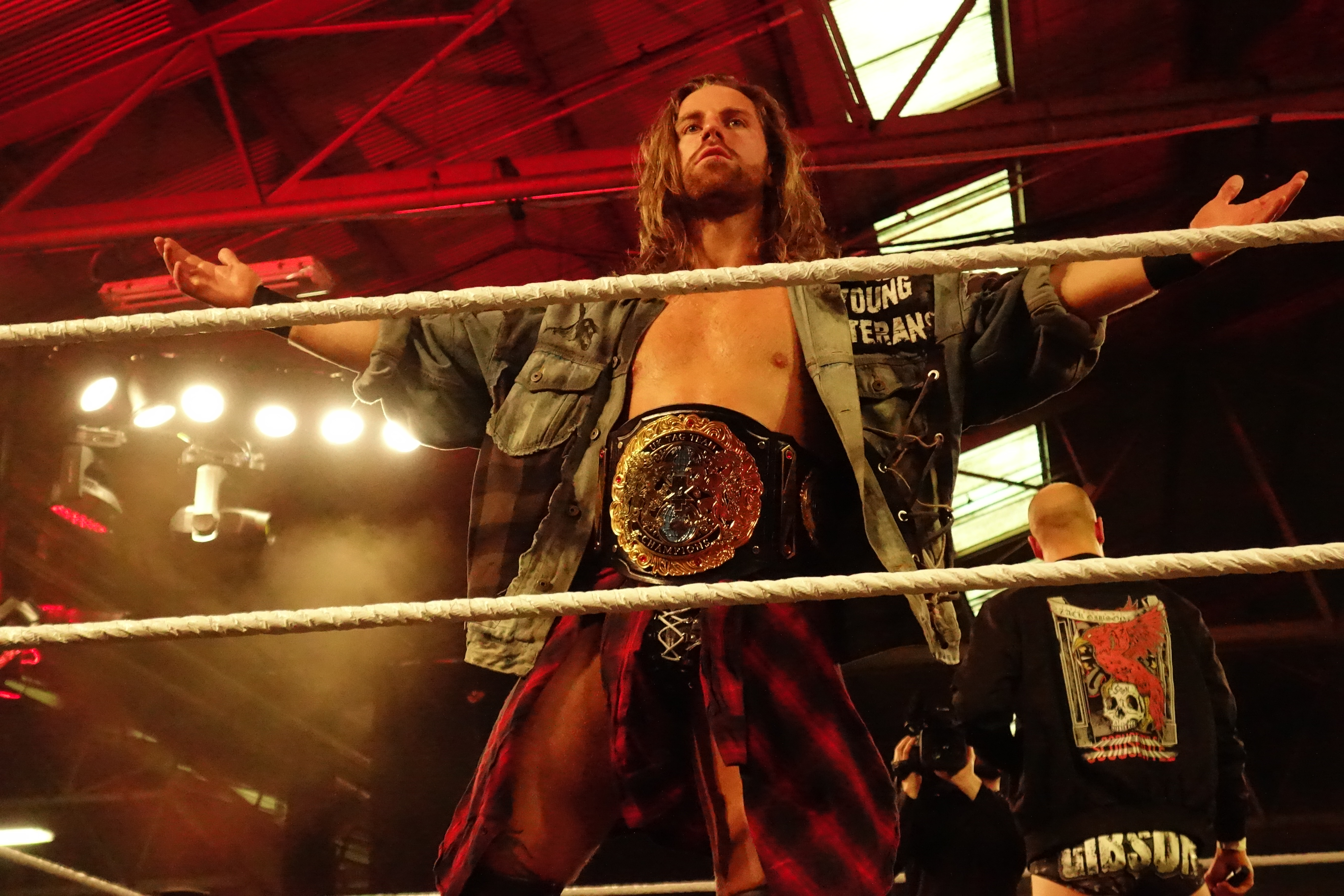 Le catcheur James Drake portant la ceinture de champion par équipes de NXT UK.